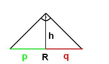 Triangle